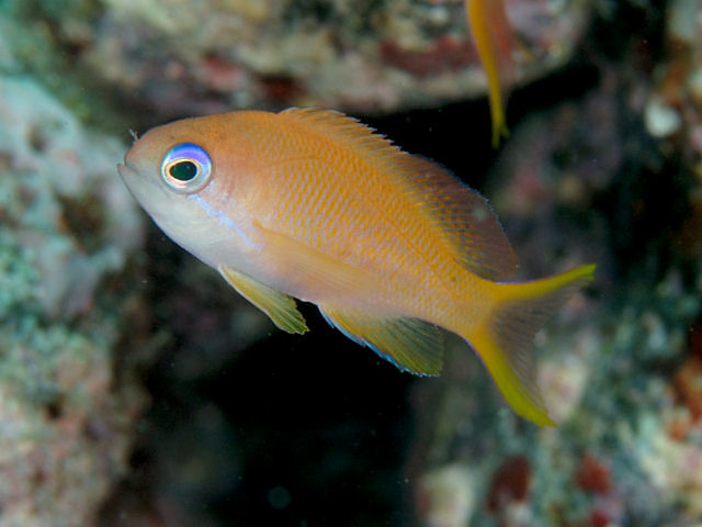 キンギョハナダイyg Pseudanthias squamipinnis